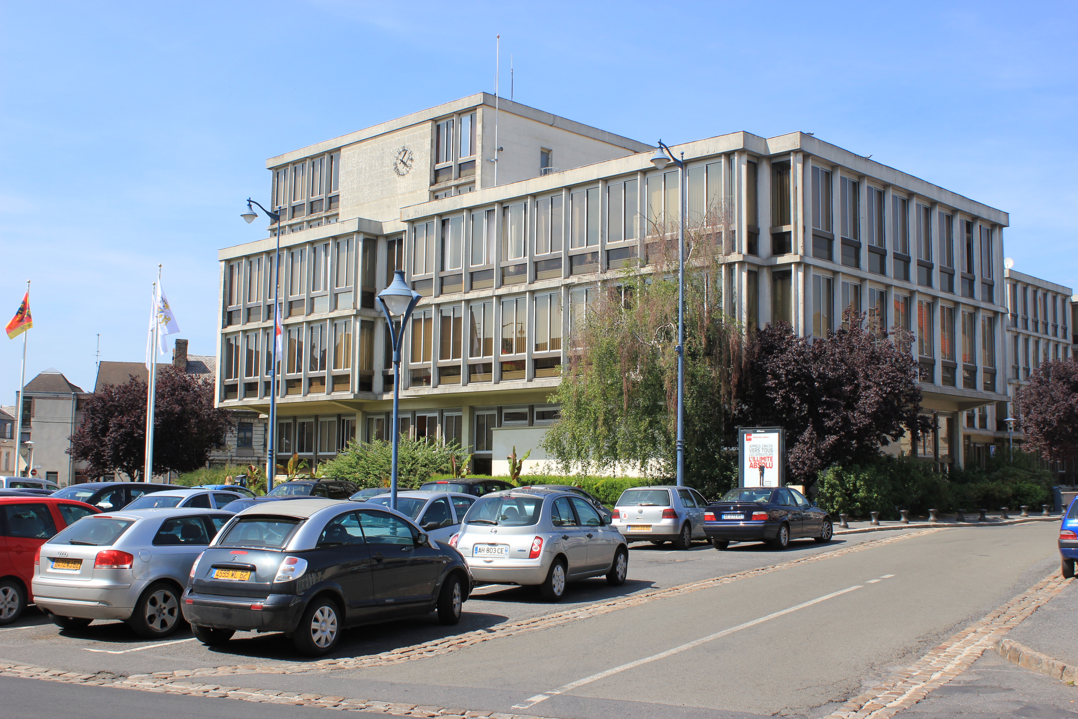 Arras (62) La Mairie